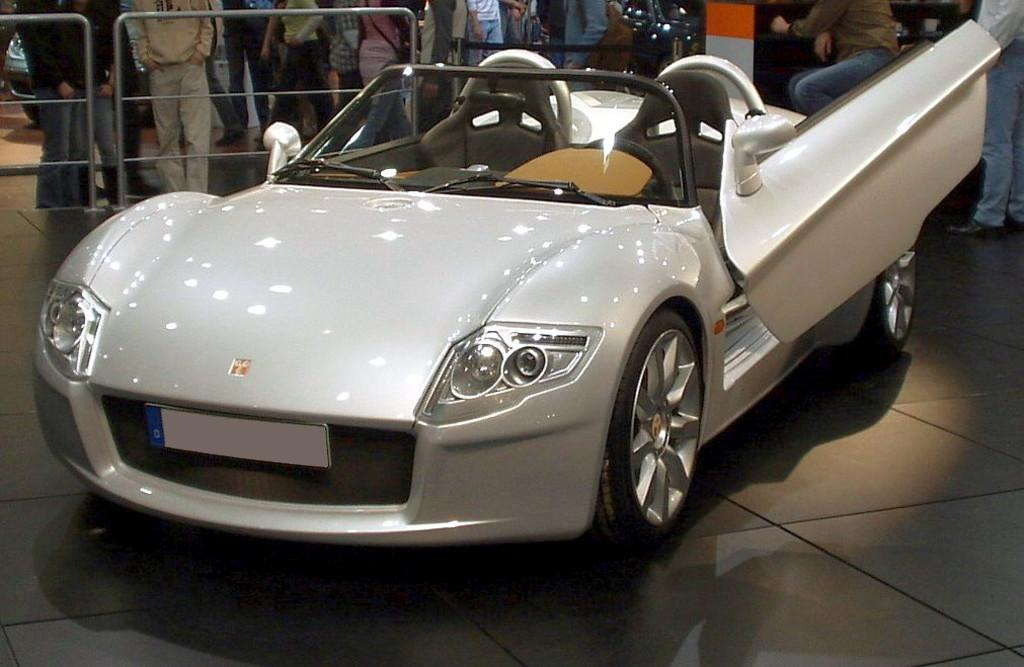 YES! Roadster